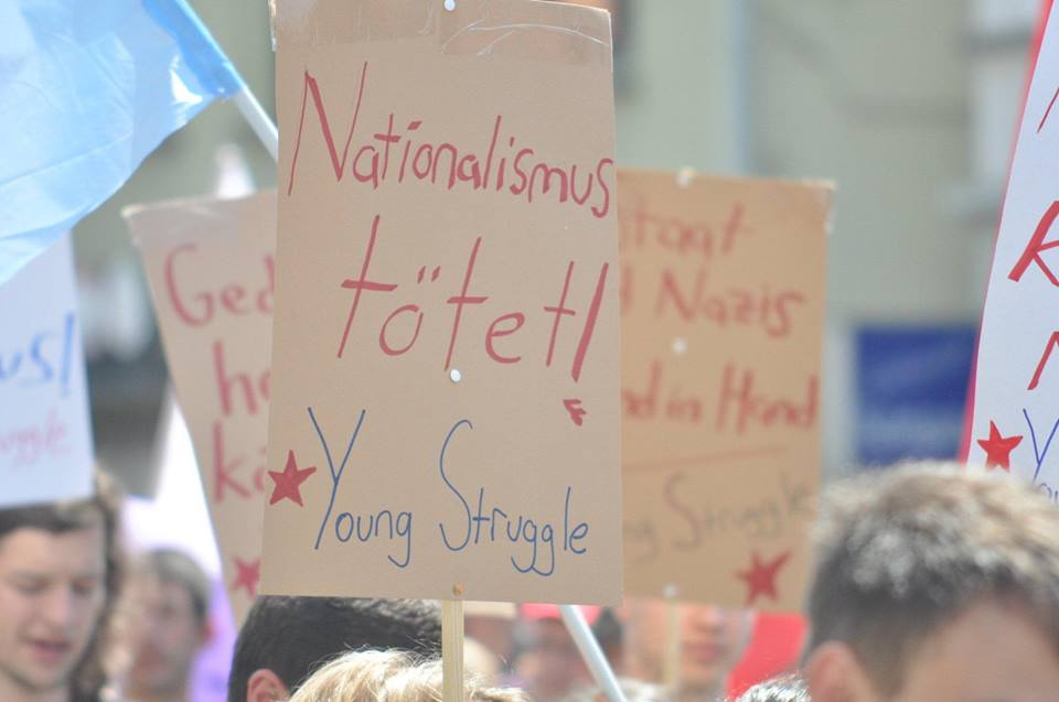 Protest gegen Nationalismus und Ermordung von MigrantInnen in Solingen